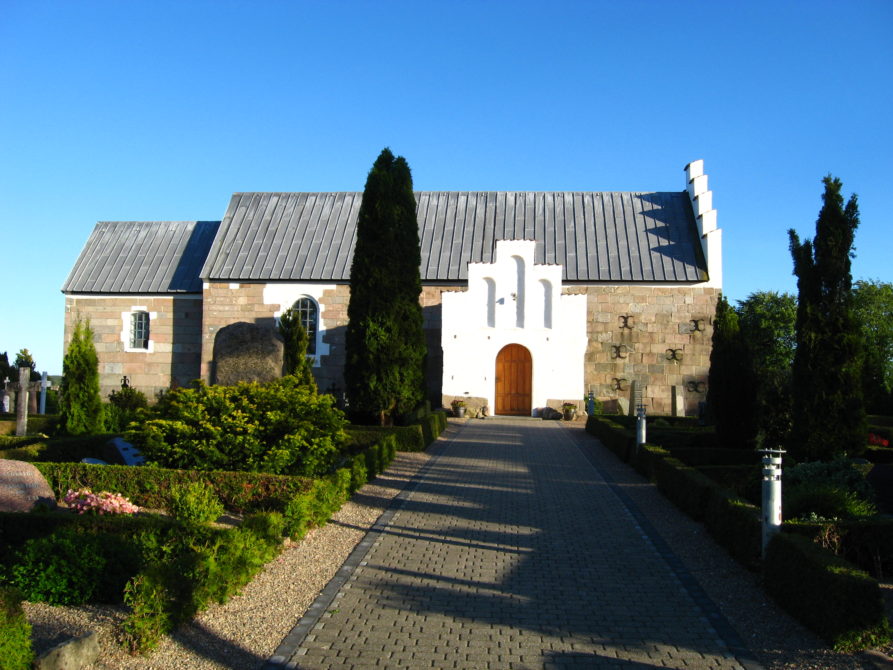 Mosbjerg Kirke, Hjørring Kommune